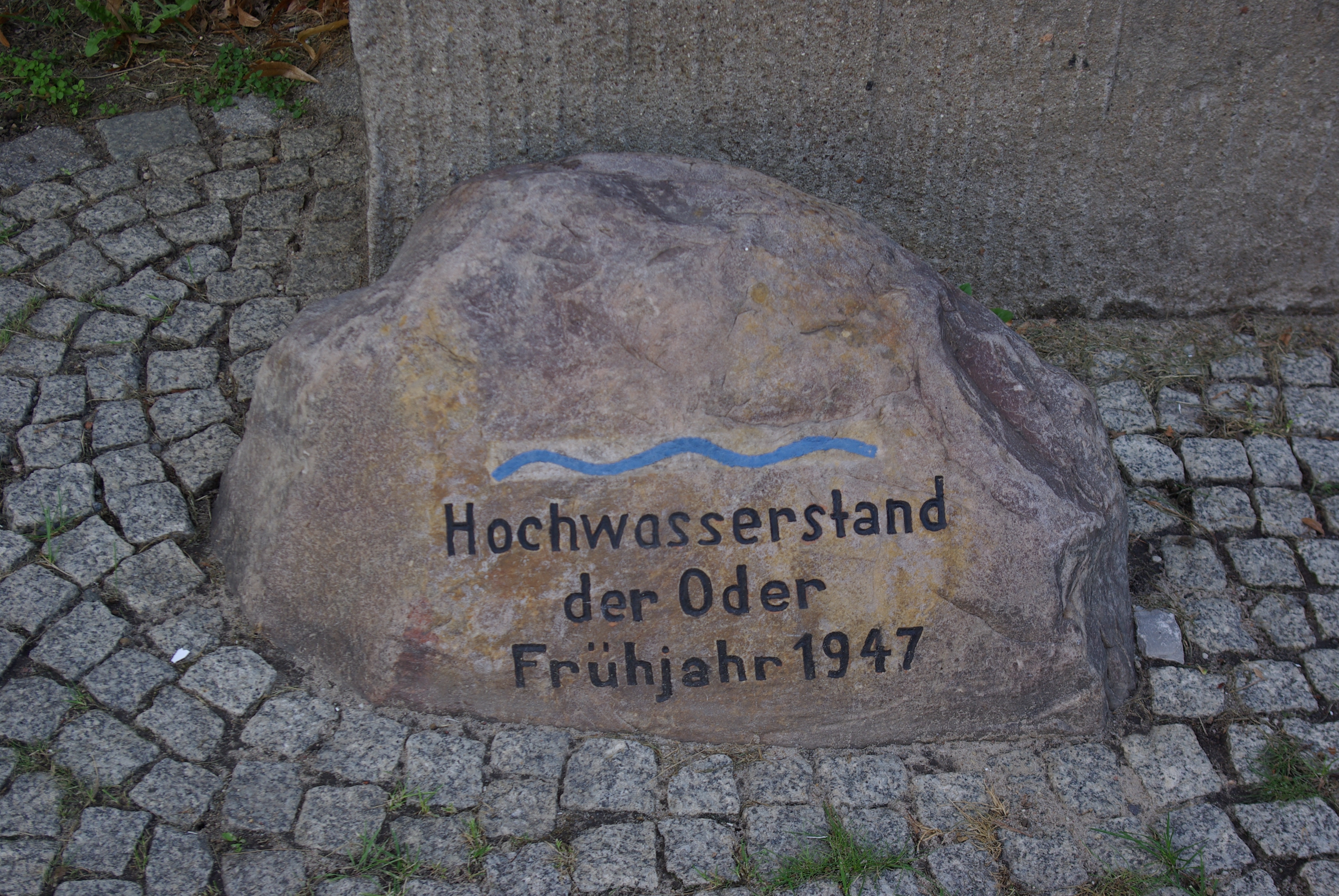 Bad Freienwald in Brandenburg. Das Stein befindet sich an dem Haus Karl-Marxstrasse 18. Der Stein steht unter Denkmalschutz.